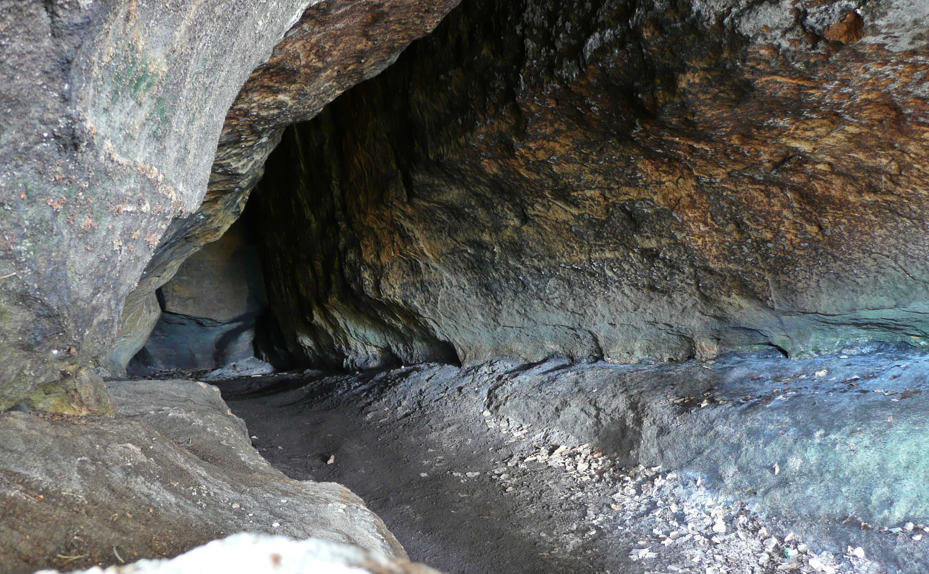 Pfaffenstein: Blick in die Goldschmidthöhle.